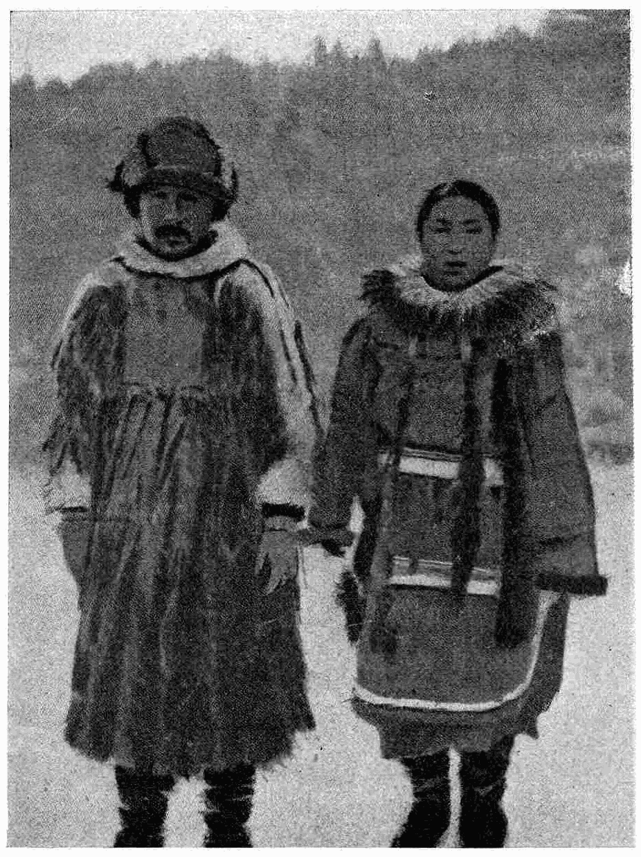 eskimaux du village de kuskokwogmut (alaska occidental)